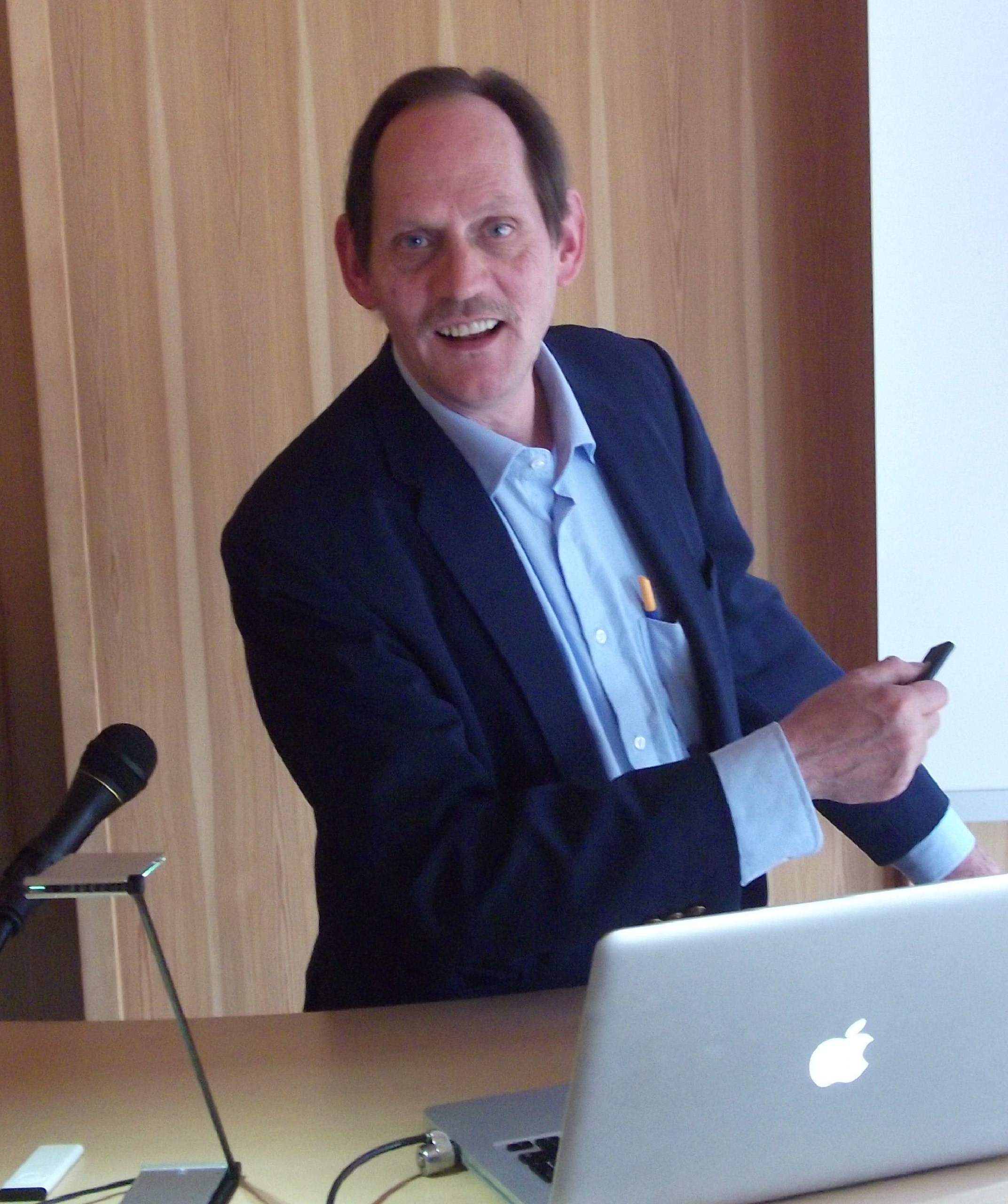 Vortrag "Before Boas", 2013 Berlin